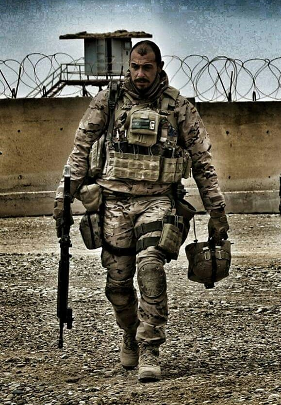 Caballero Legionario regresando de una misión de escolta en Irak